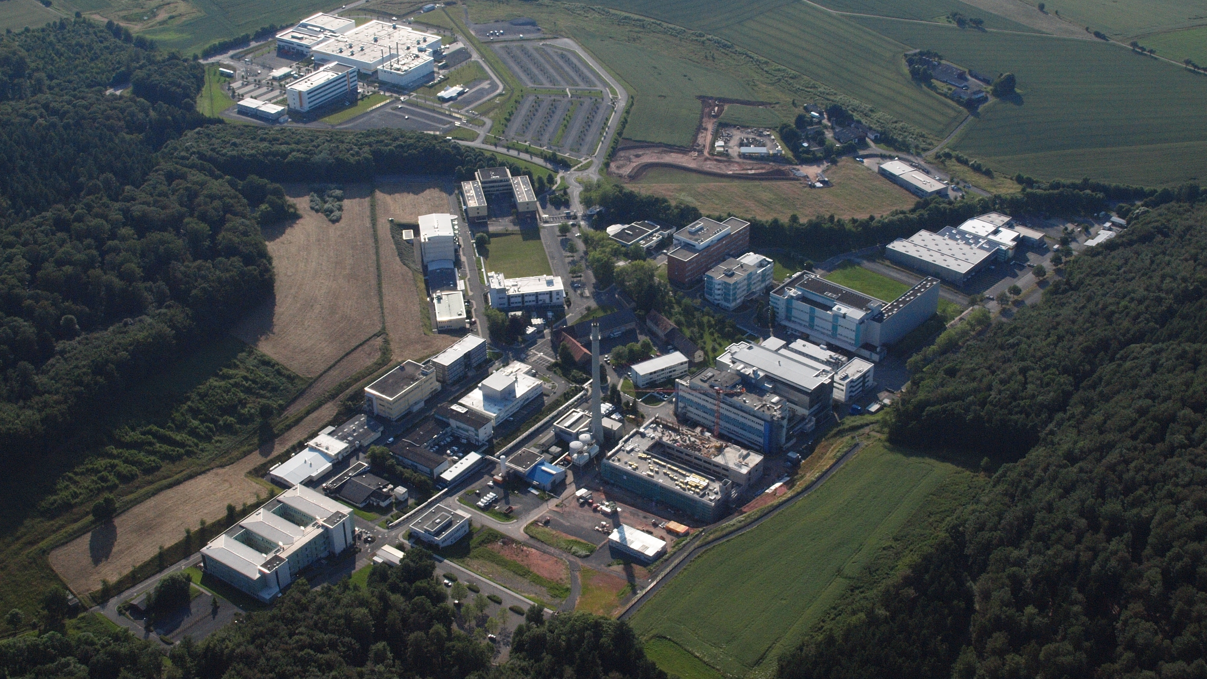 Marburg, Behringwerk Görzhausen: Luftaufnahme